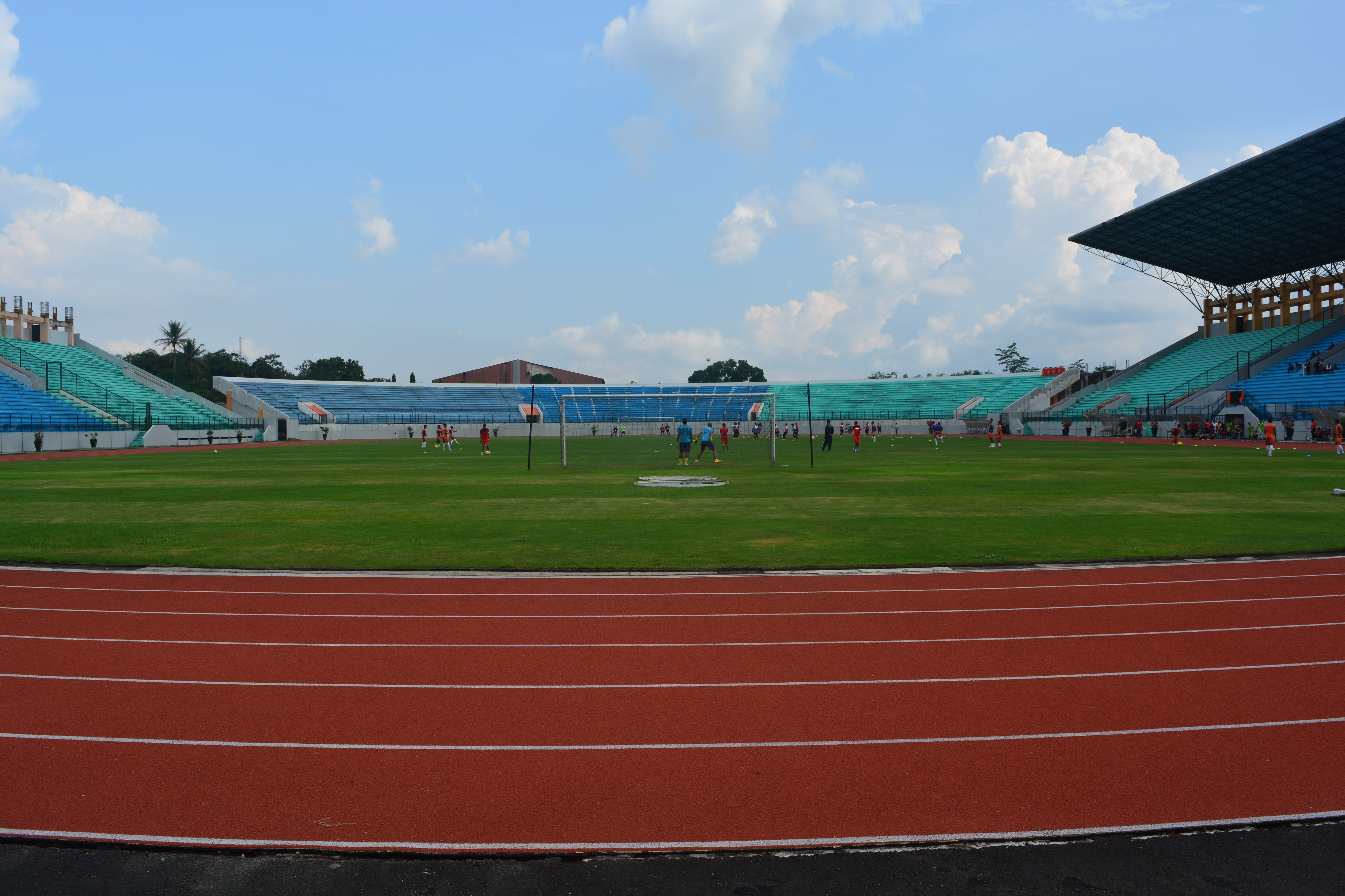 Foto ini diambil saat pertandingan PPSM vs Persijap pada tanggal 23 Juli 2016